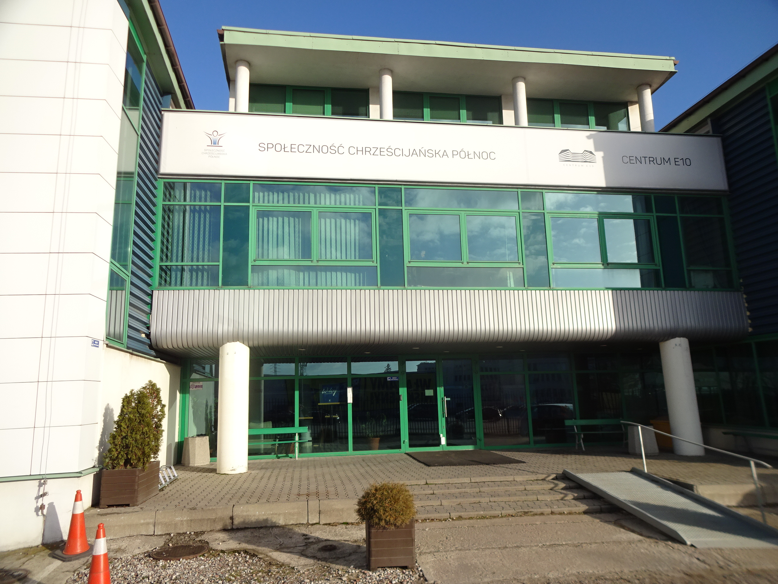 Społeczność Chrześcijańska Północ w Warszawie 2018-12-05